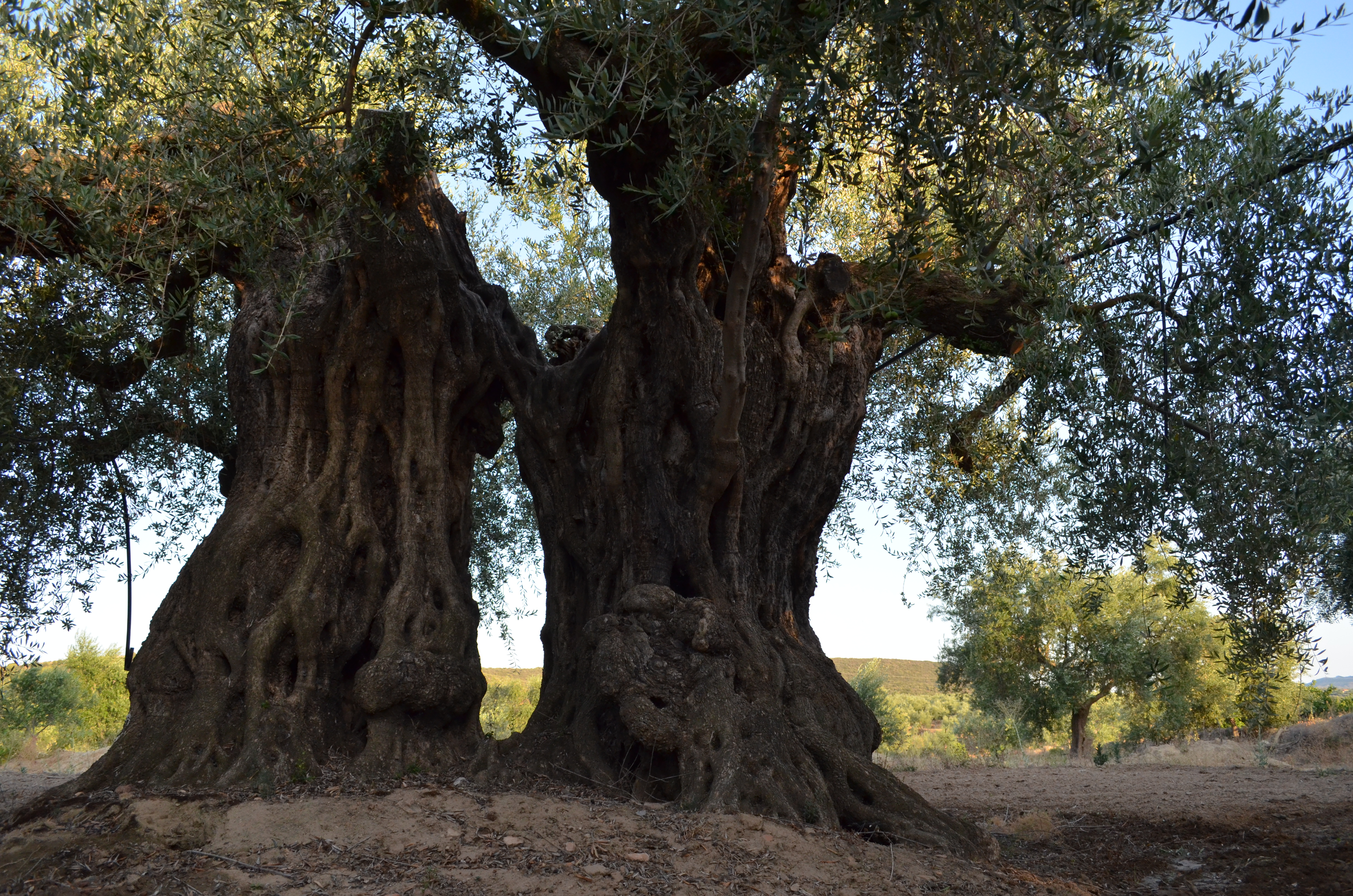 Αρχαίο Ελαιόδεντρο στο χωριο Ελιά Λακωνίας